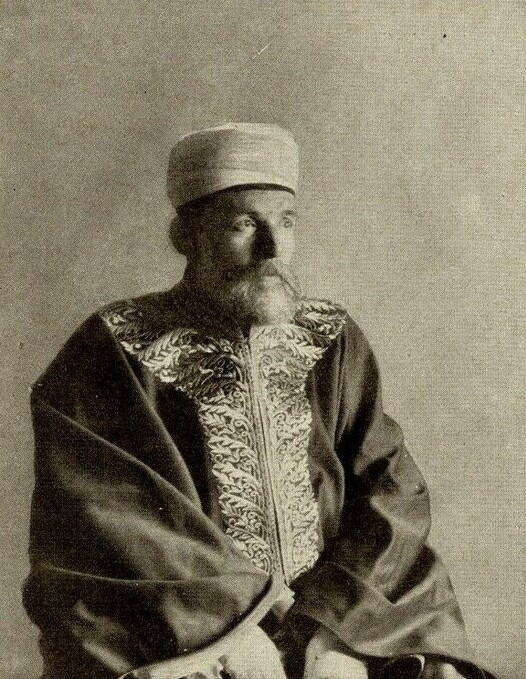 Reis-ul-Ulema Dzemaluddin eff. Causevic (1870-1938)